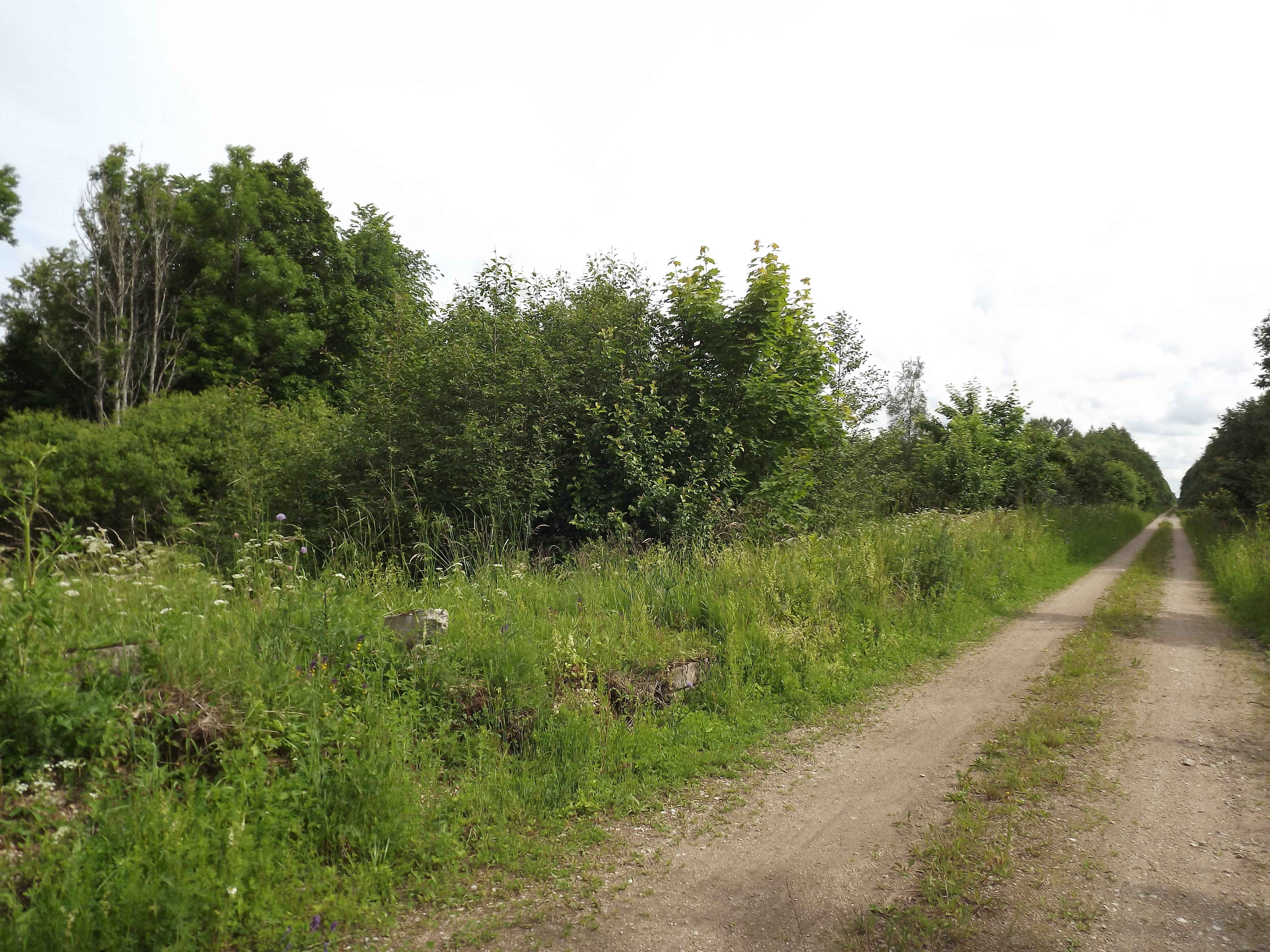 Endise Metsa raudteepeatuse rohtunud perroon.